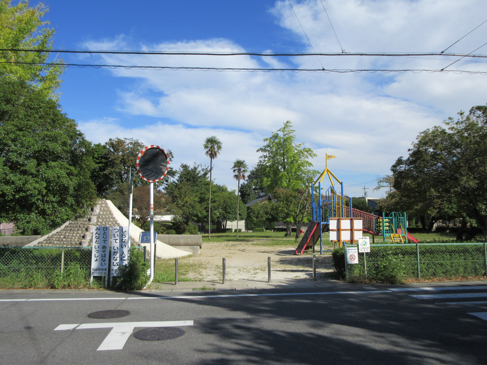 熊野公園（岡崎市六名1丁目）